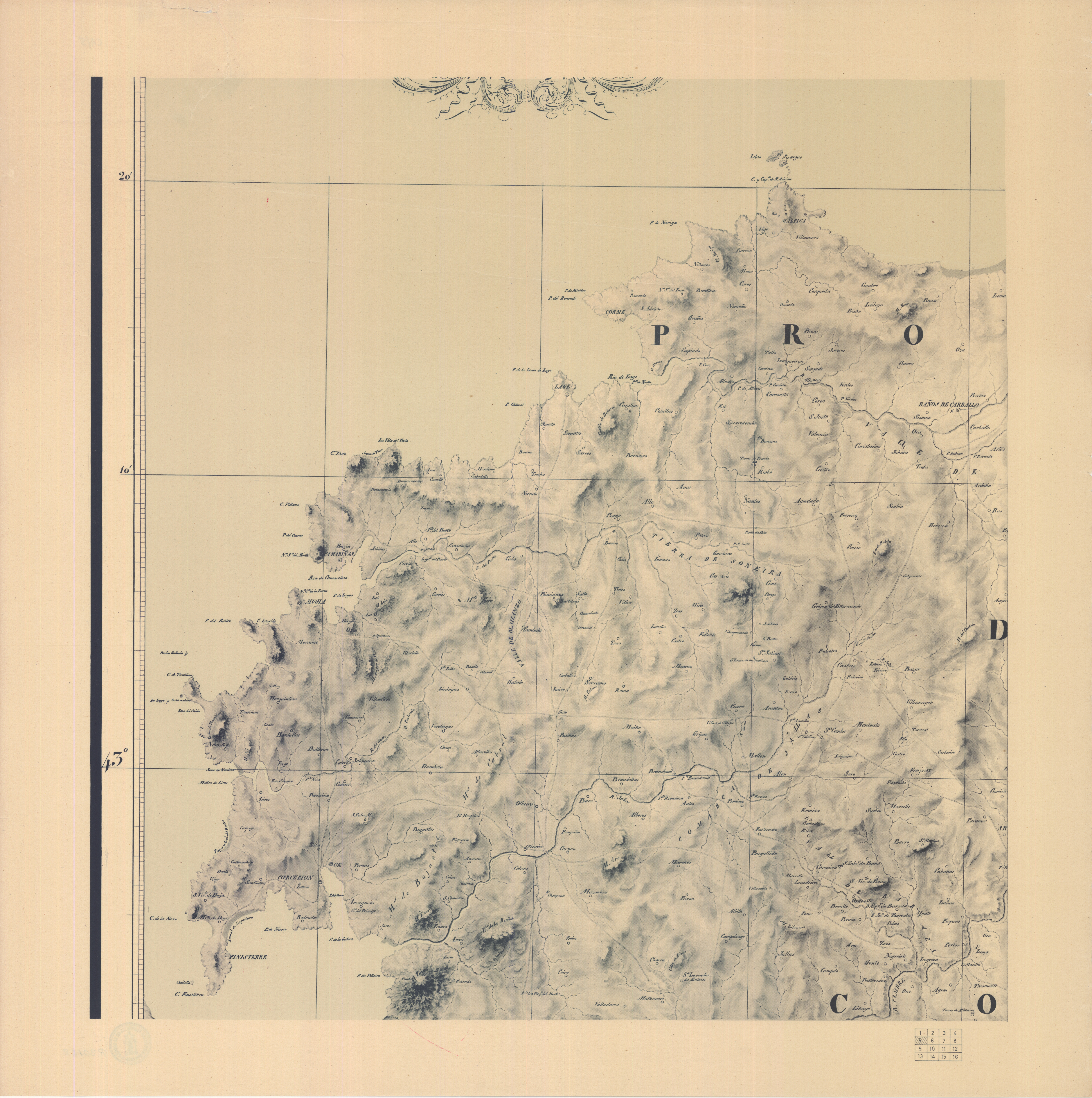 CARTA GEOMETRICA D E Galicia Dividida en sus Provincias de Coruña, Lugo, Orense, Pontevedra, y subdividida en Partidos judiciales ó Alcaldias mayores; PRESENTADA À S.M. LA AUGUSTA REINA GOVERNADORA Doña Maria Cristina de Borbon Por mano de su Secretario de Estado y del Despacho de lo Interior EL EXCMO. S. D. JOSE MARIA MOSCOSO DE ALTAMIRA Levantada y construida en la escala de cienmilesimo POR EL DOCTOR D. DOMINGO FONTAN, Catedràtico de Matemàticas Sublimes en la Real Universidad de Santiago, y de Mecanica industrial por el Real Conservatorio de Artes, Socio correspondiente dela Real Academia de la Historia. AÑO DE 1834